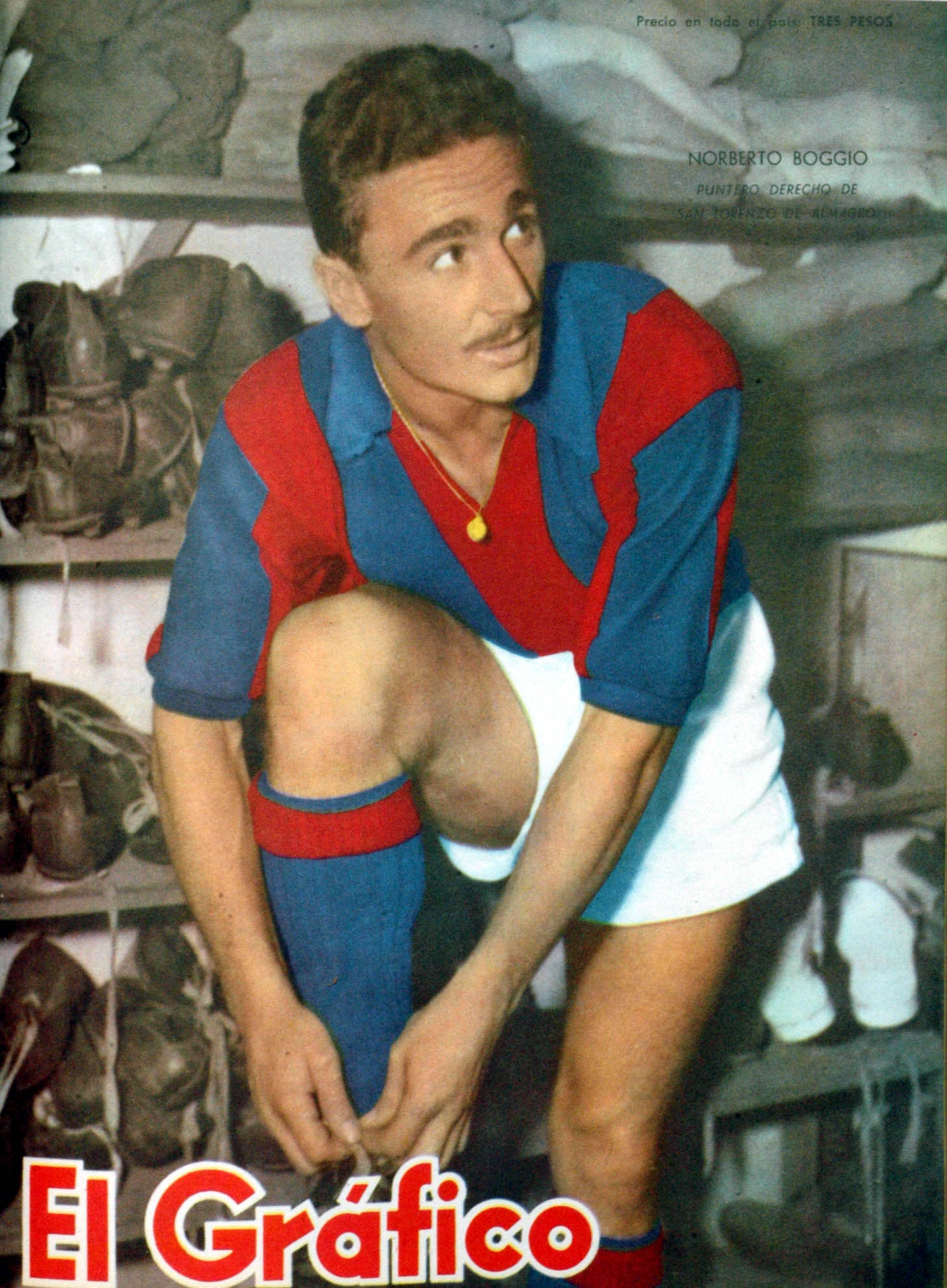 El Grafico del 11 de Octubre de 1957. Edicion 1987